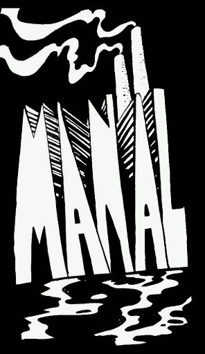 Es el logo del grupo argentino Manal.